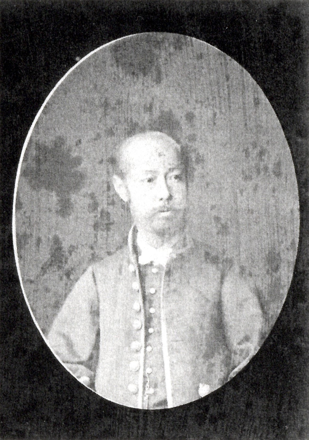 木下俊愿の肖像写真。